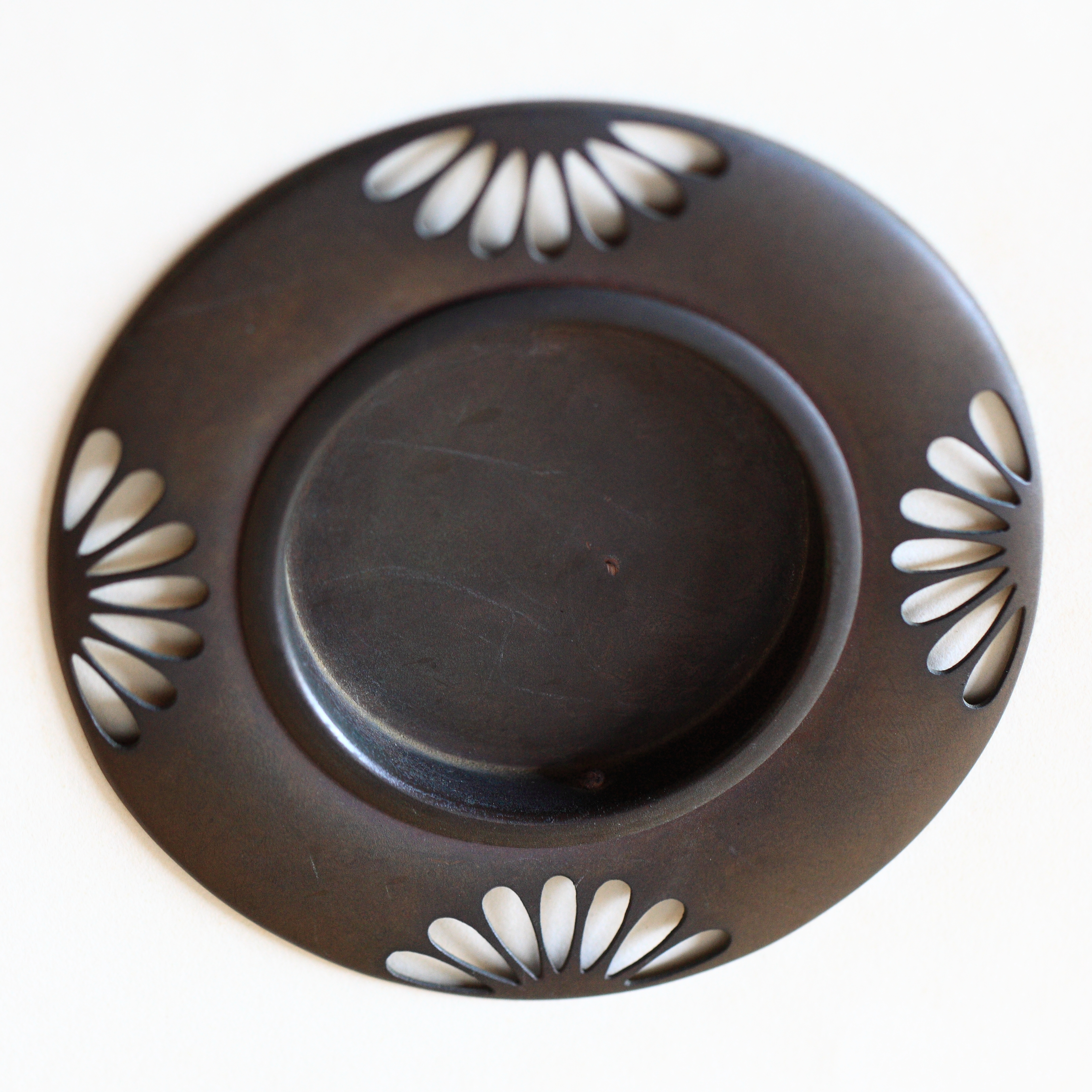 Koubun-tei(house) Kairaku-en(garden), Mito-shi(city) Ibaraki-ken(Prefecture), Japan %u8328%u57CE%u770C%u6C34%u6238%u5E02(%u3044%u3070%u3089%u304D%u3051%u3093 %u307F%u3068%u3057) %u5055%u697D%u5712(%u304B%u3044%u3089%u304F%u3048%u3093) %u597D%u6587%u4EAD(%u3053%u3046%u3076%u3093%u3066%u3044)